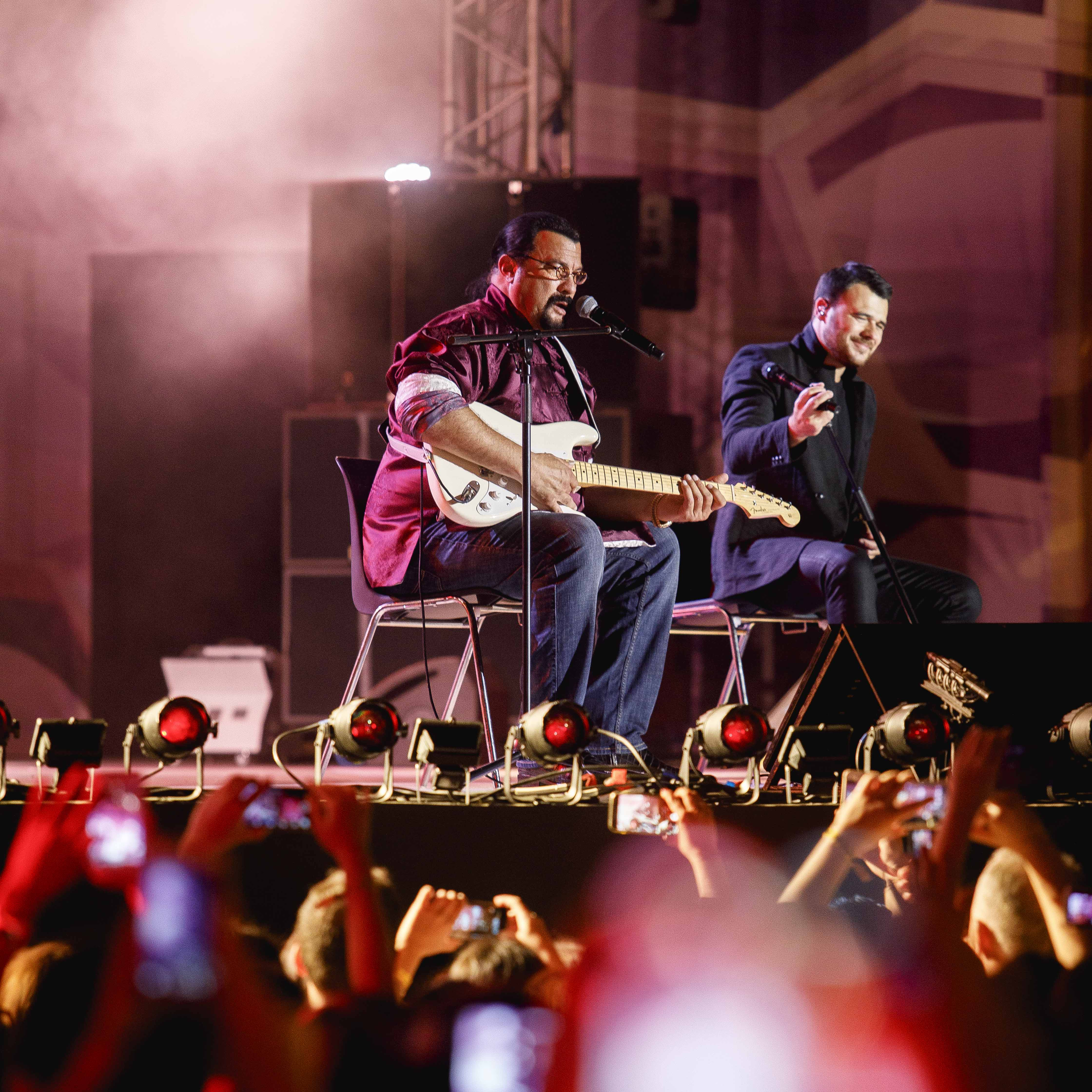 Стивен Сигал и Эмин на фестивале «Жара», 2018.